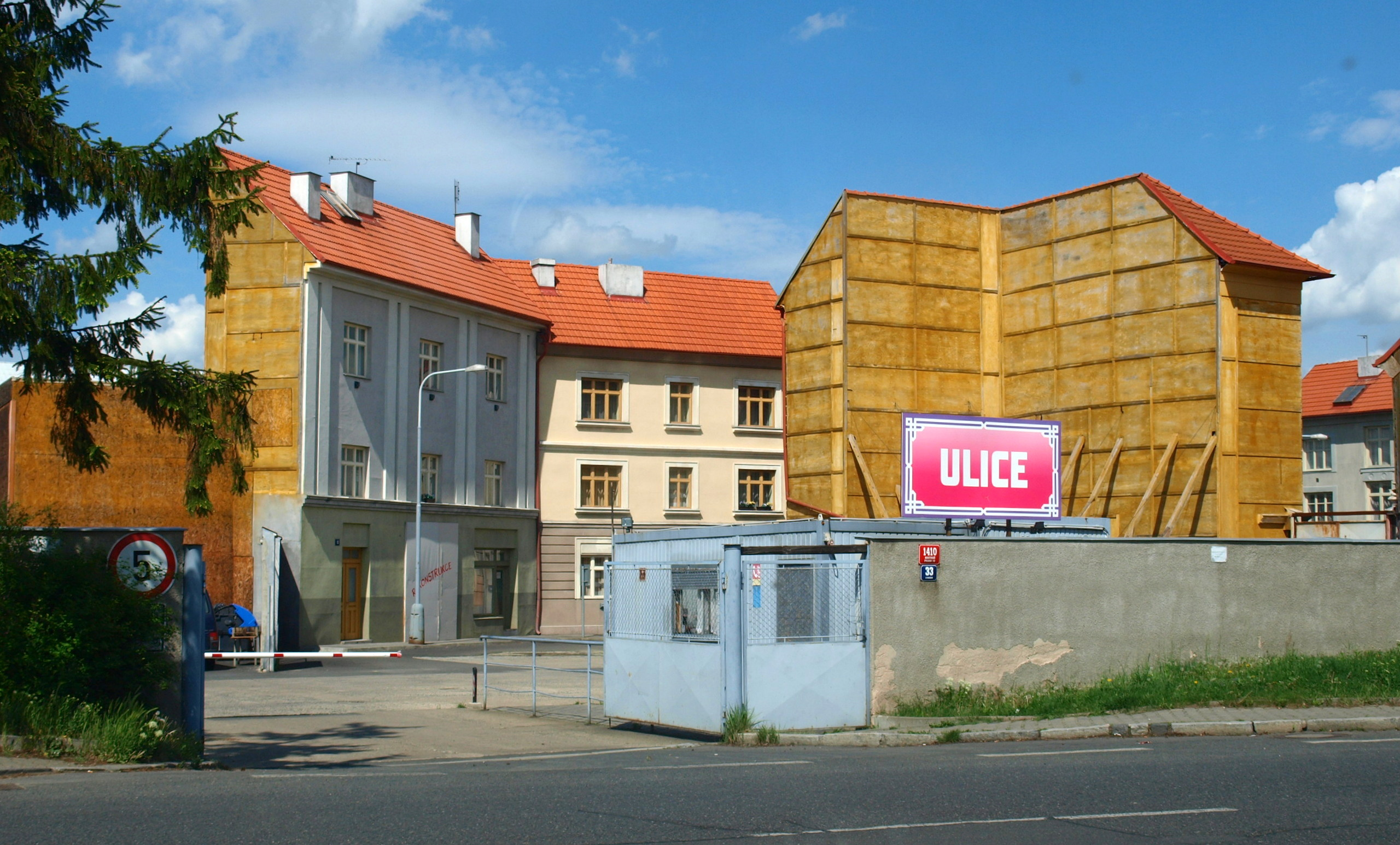 Praha 15, Hostivař